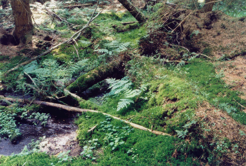 Česky: Křížový kámen - porost